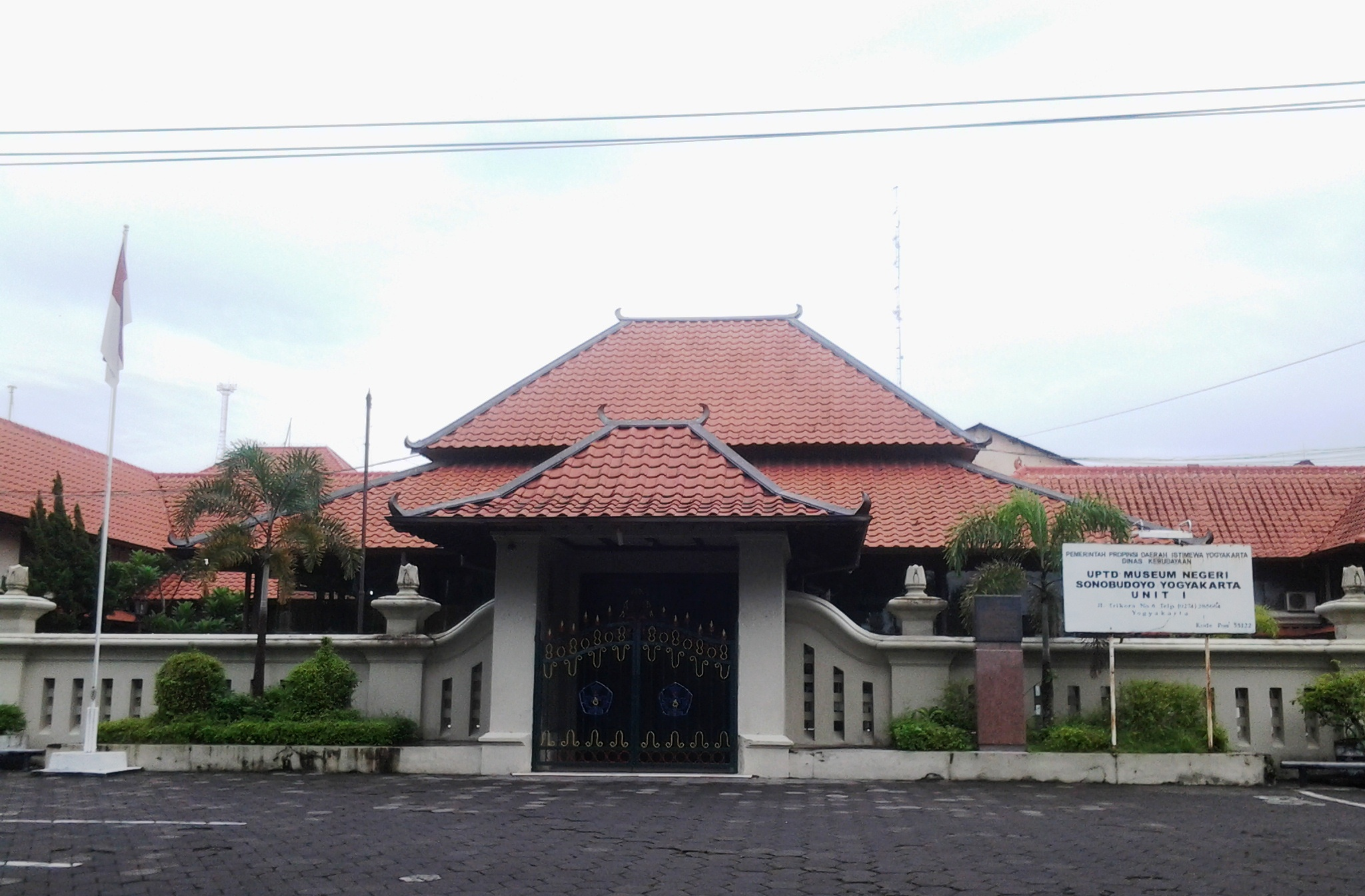 Museum Sonobudoyo Yogyakarta Unit 1